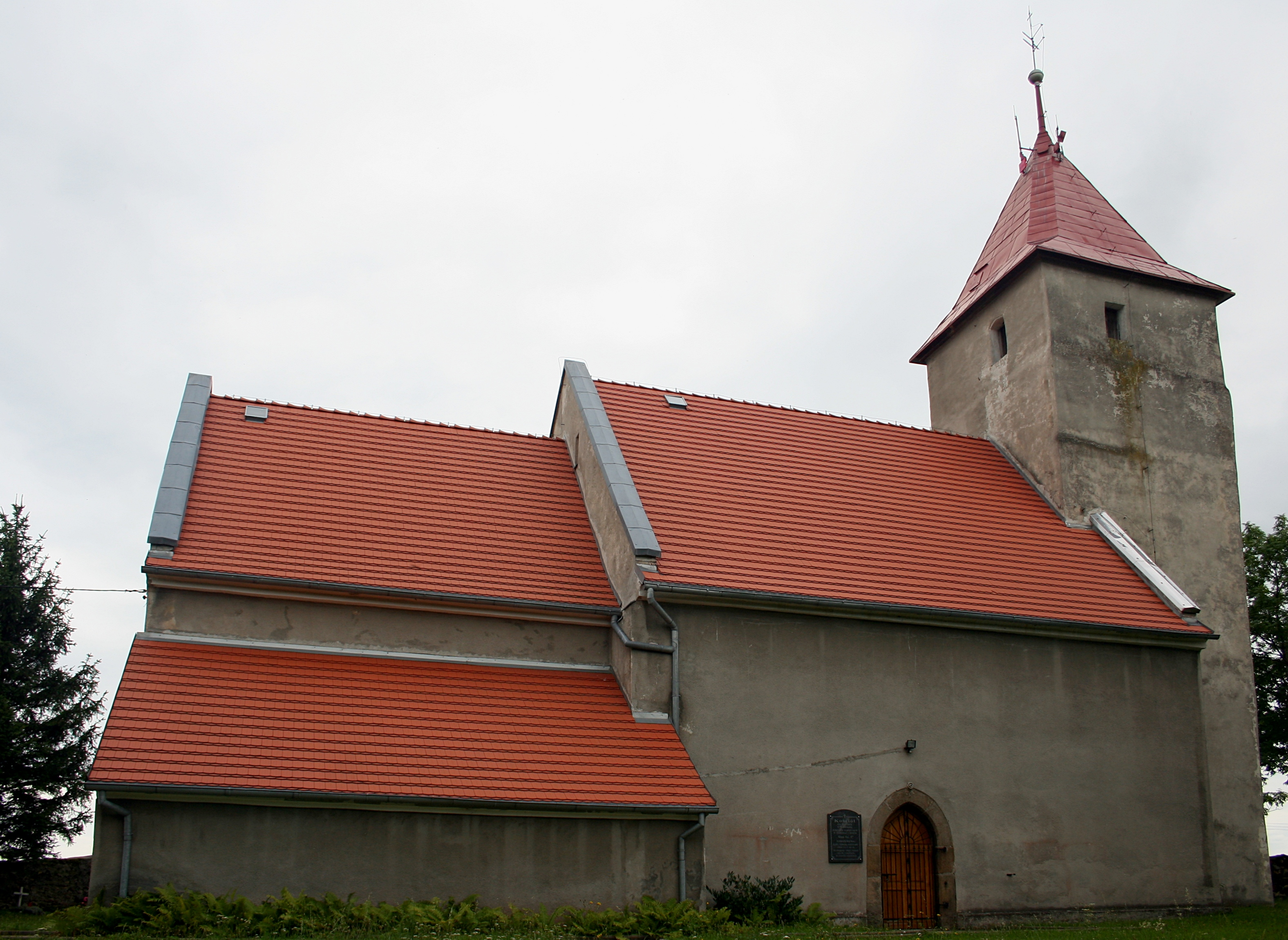 Kościół św. Barbary w Wolbromku, powiat jaworski